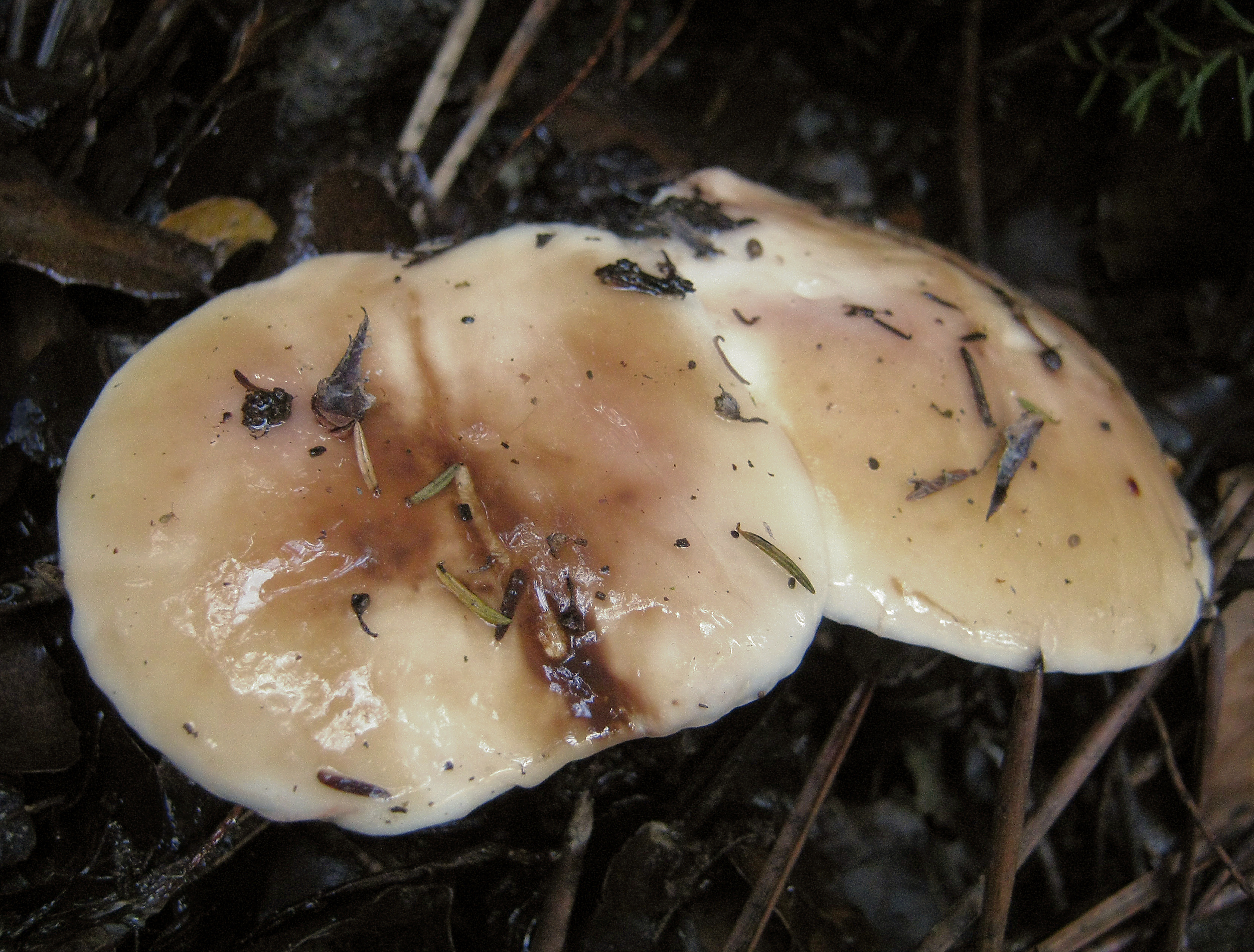 Suillus bellinii (Inzenga) Kuntze